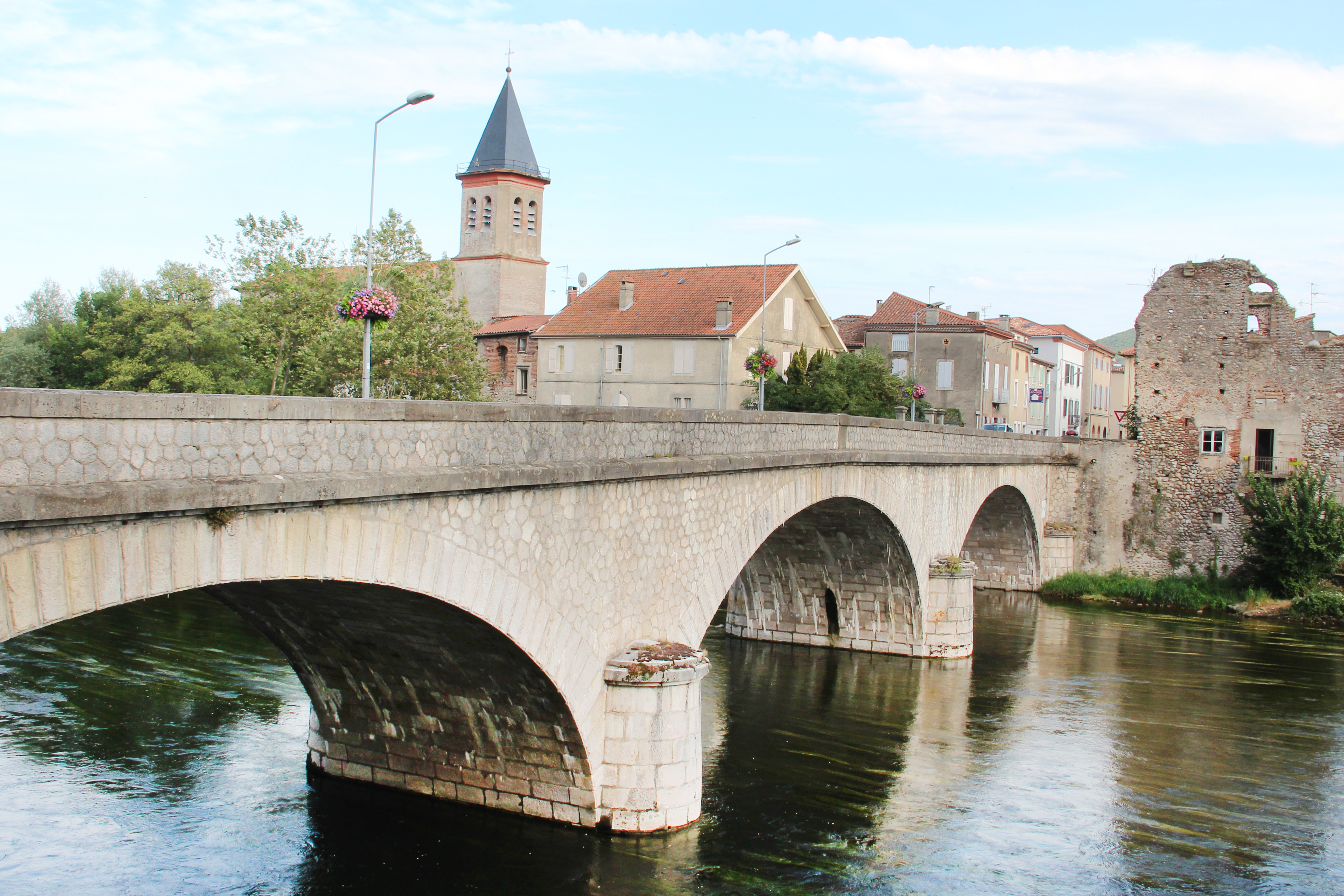 L'église et le pont de Varilhes